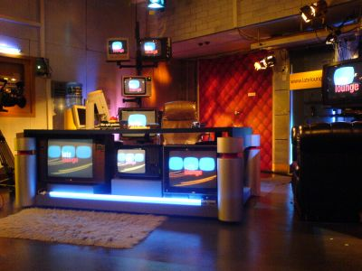 Studiodekoration der Late Lounge